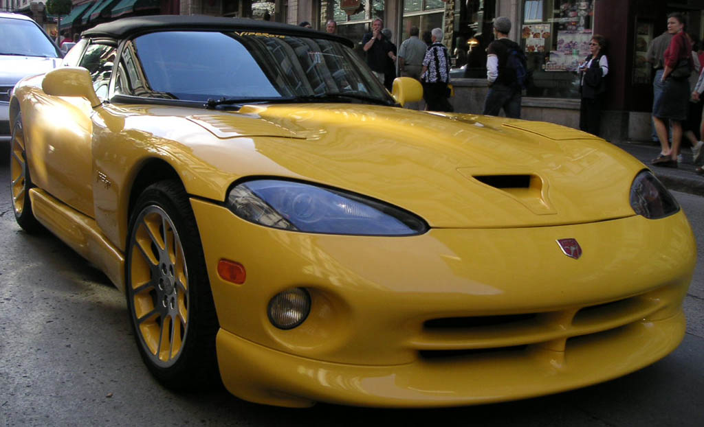 Photo d'une Dodge Viper prise dans les rues de Québec